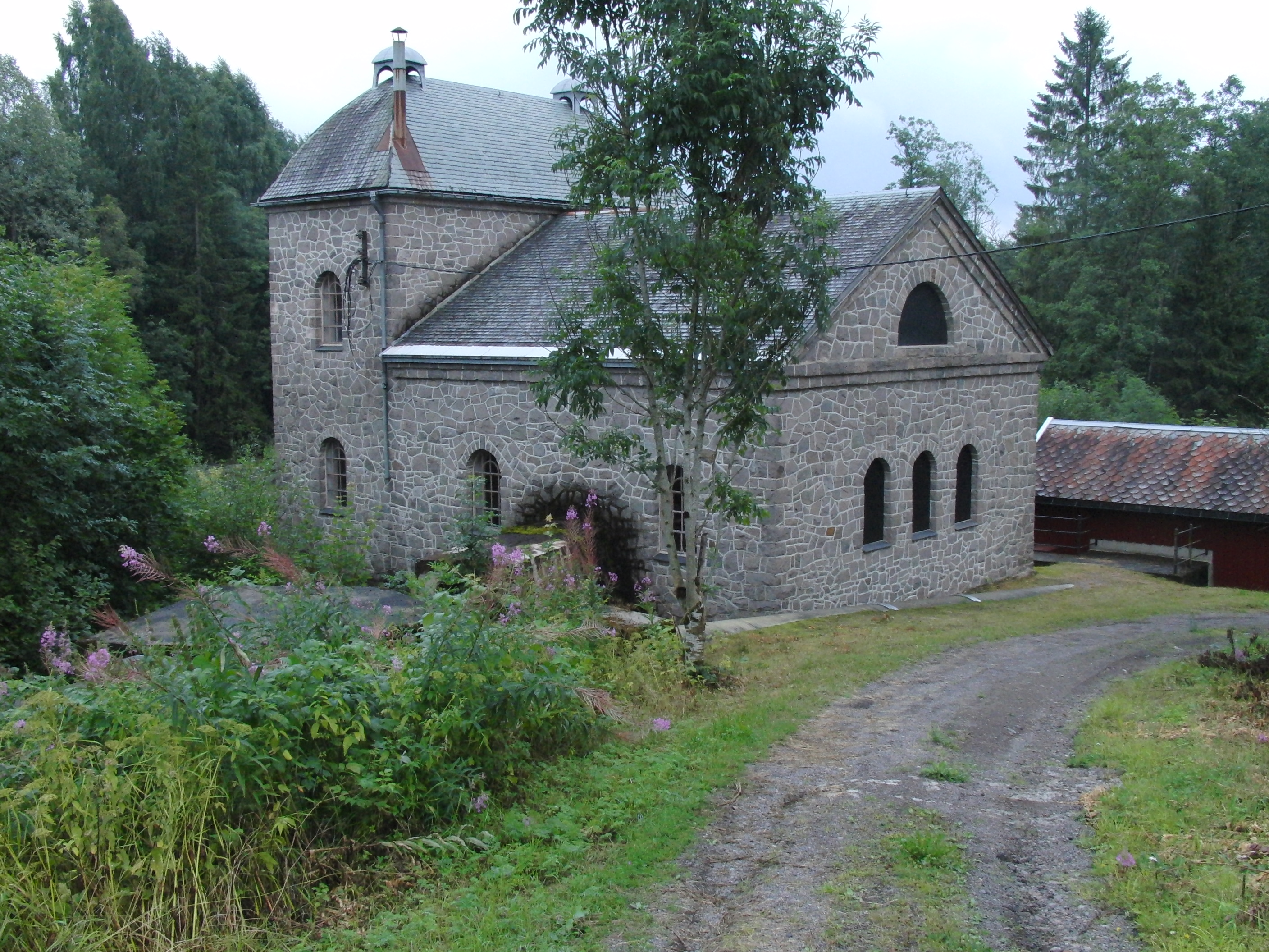 Verksfossen kraftverk